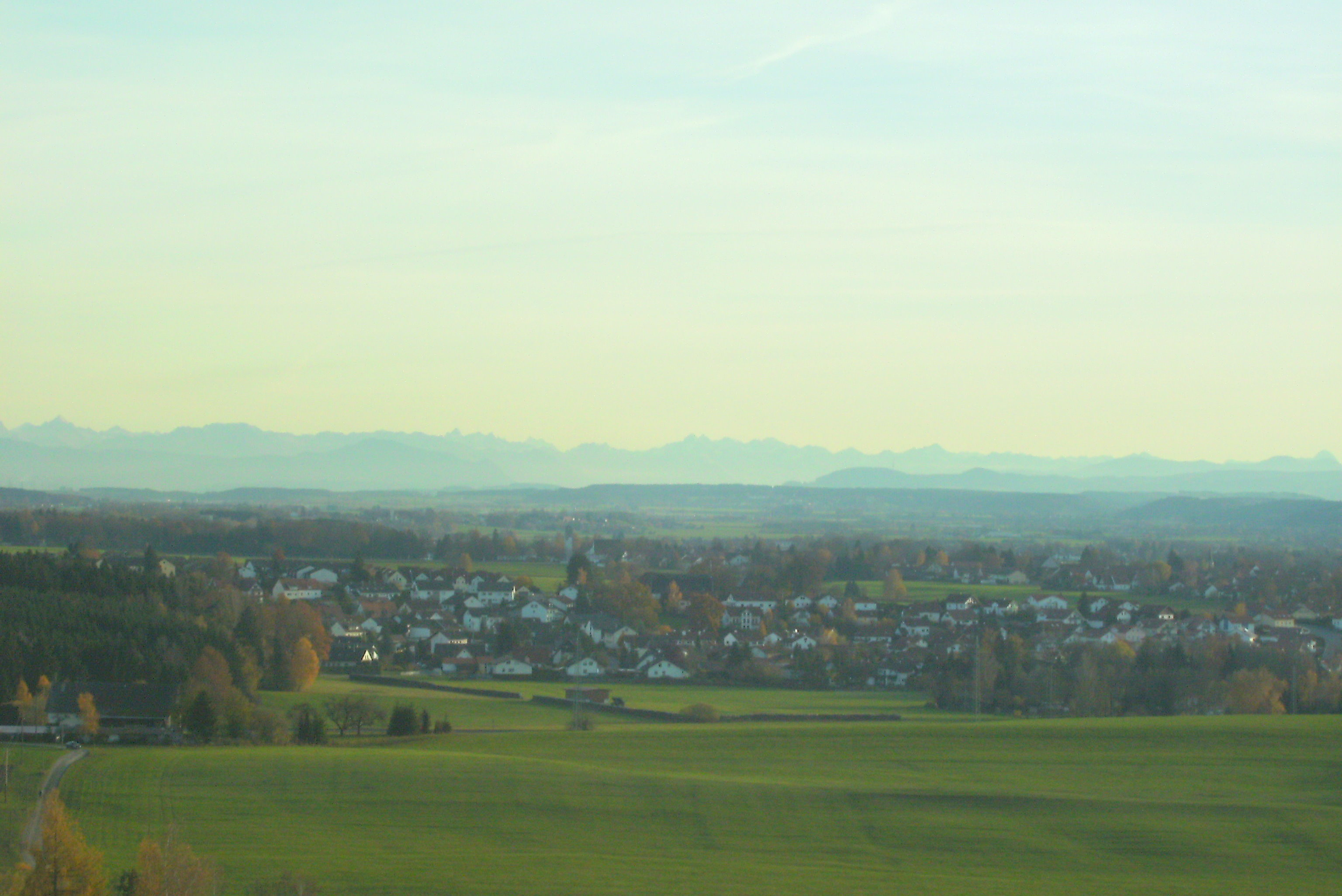 Trunkelsberg von Schloß Eisenburg